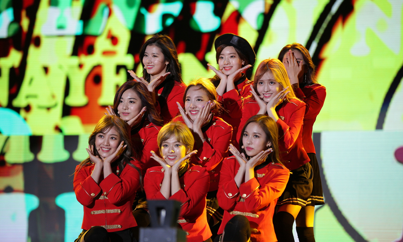 트와이스(TWICE) G페스티벌 아시아 드림 콘서트